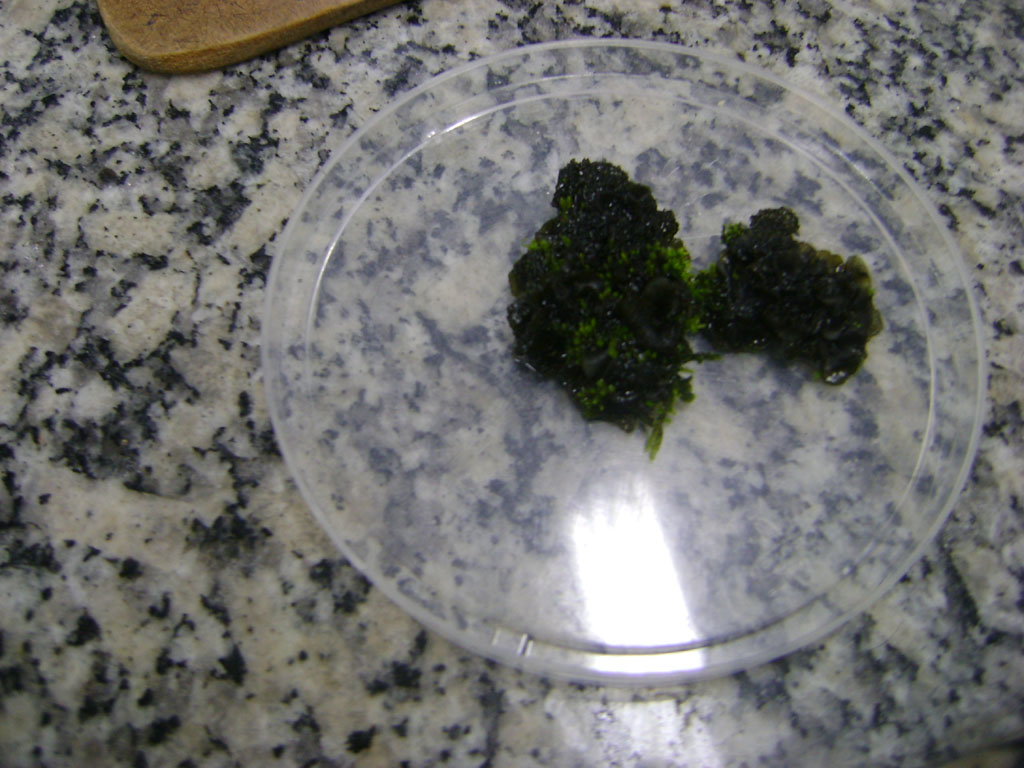 Liquen gelatinoso